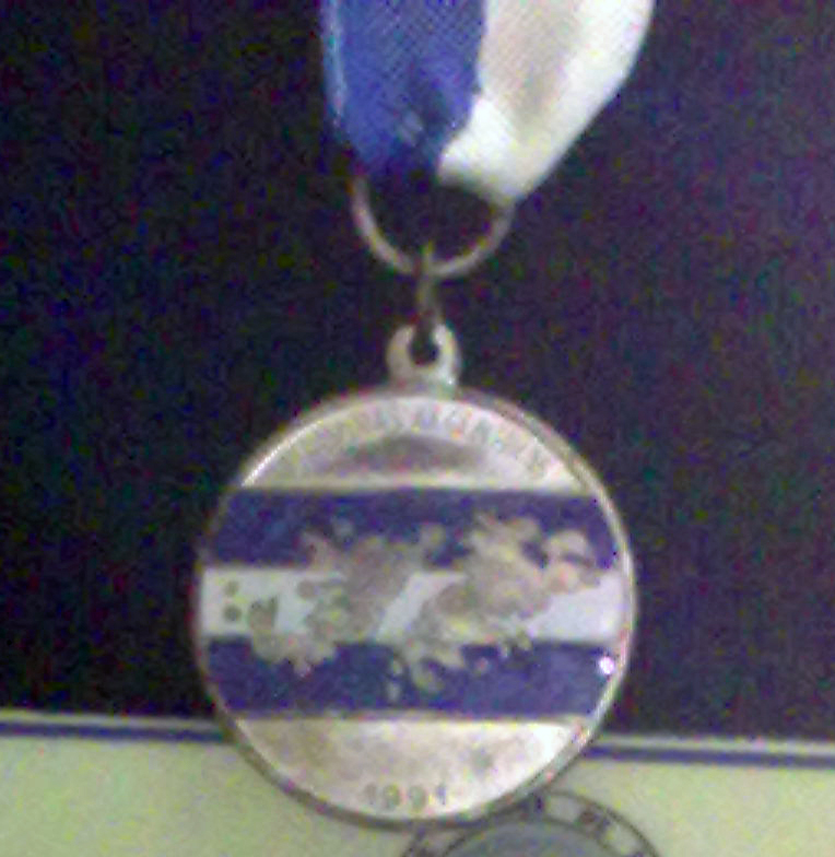 a los Combatientes